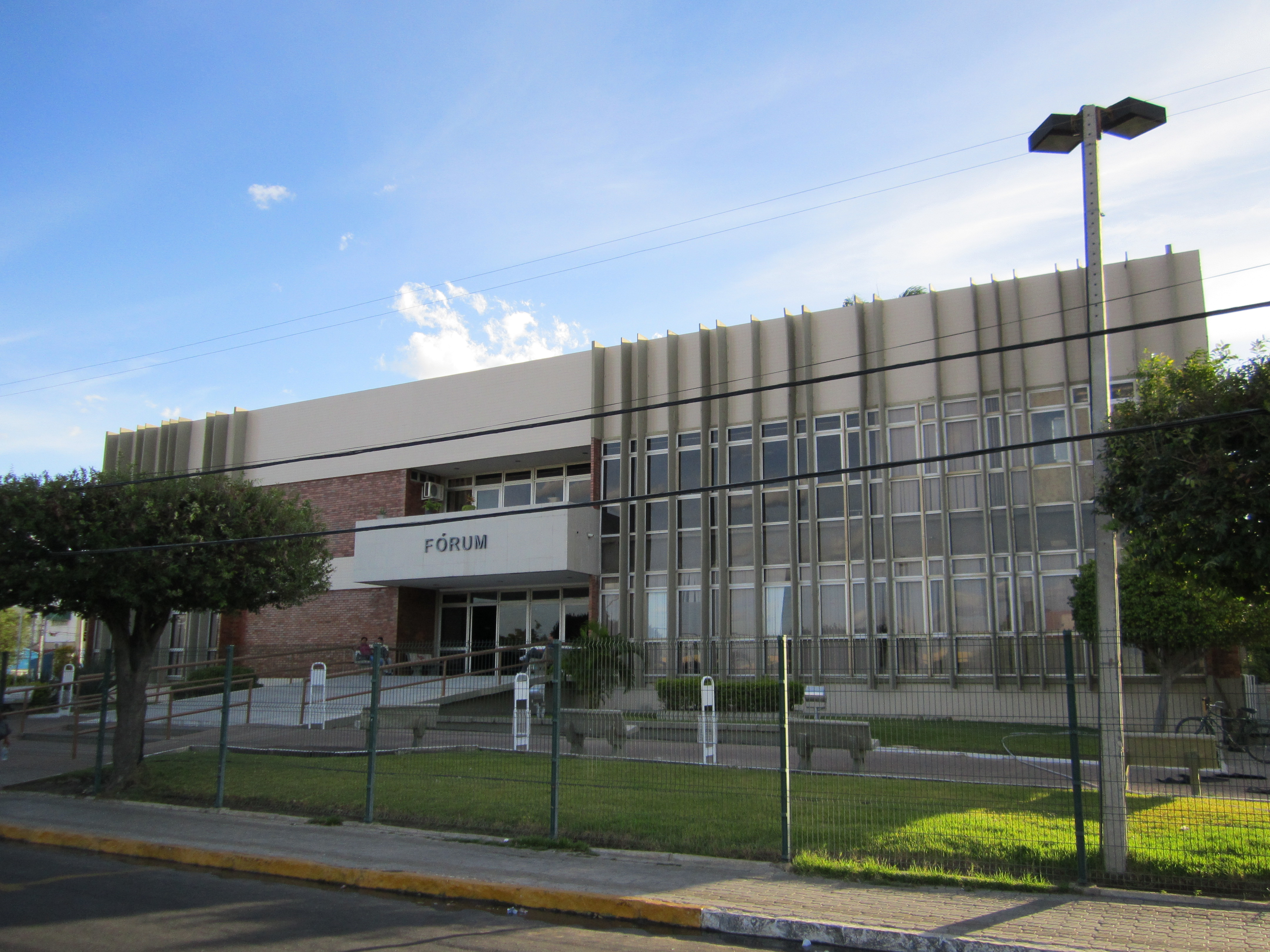 Fórum - Petrolina, Pernambuco, Brasil